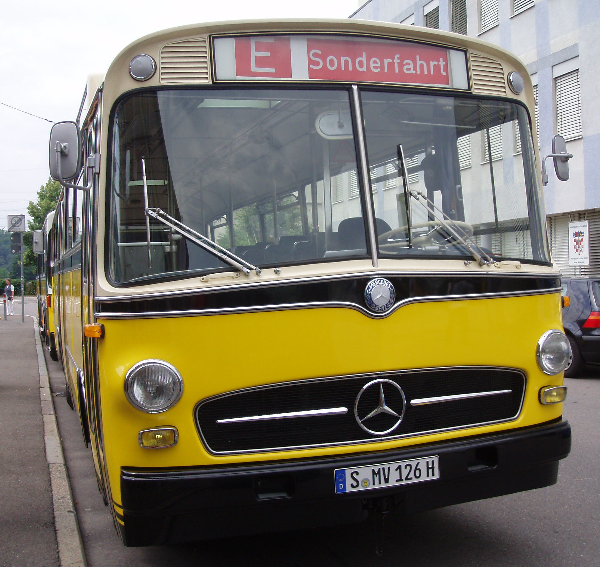 Eröffnung der Straßenbahnwelten Stuttgart, O 322, EZ 1961